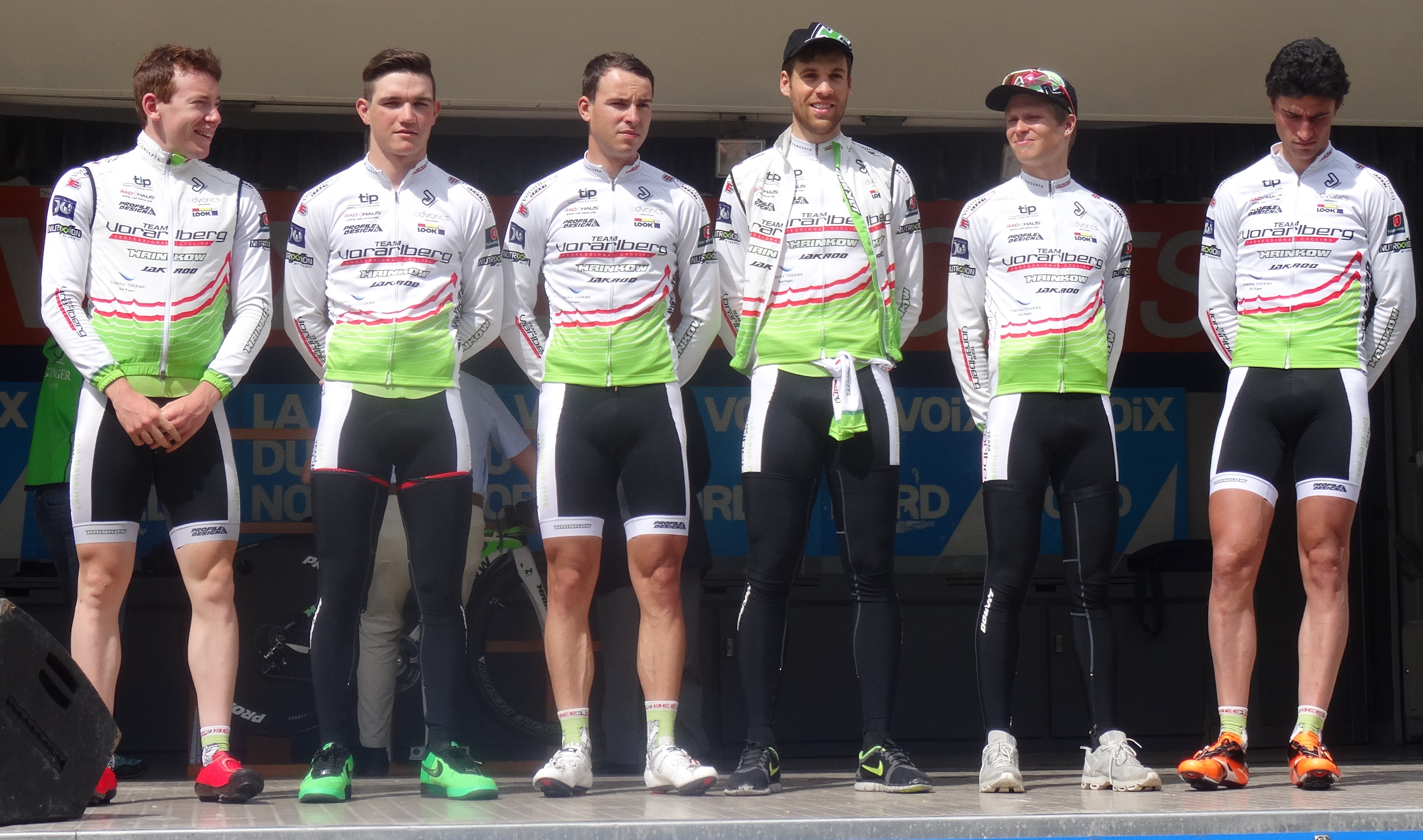 Reportage photographique réalisé le vendredi 23 mai 2014 à l'occasion du départ de la première étape du Paris-Arras Tour 2014 à Lens, Pas-de-Calais, Nord-Pas-de-Calais, France. Depicted people: Fabian Schnaidt, Patrick Jäger, Christoph Springer, Grischa Janorschke, Nicolas Winter and Nicolas Baldo